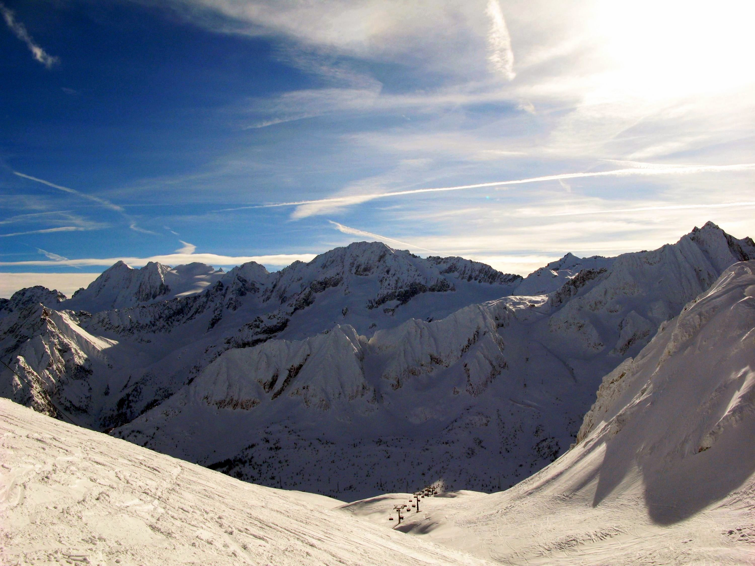 Passo del Tonale - Panorama Bleis ( 2525m) view from Pista Paradiso & Cima Presena and Cima Presanella (3556m)